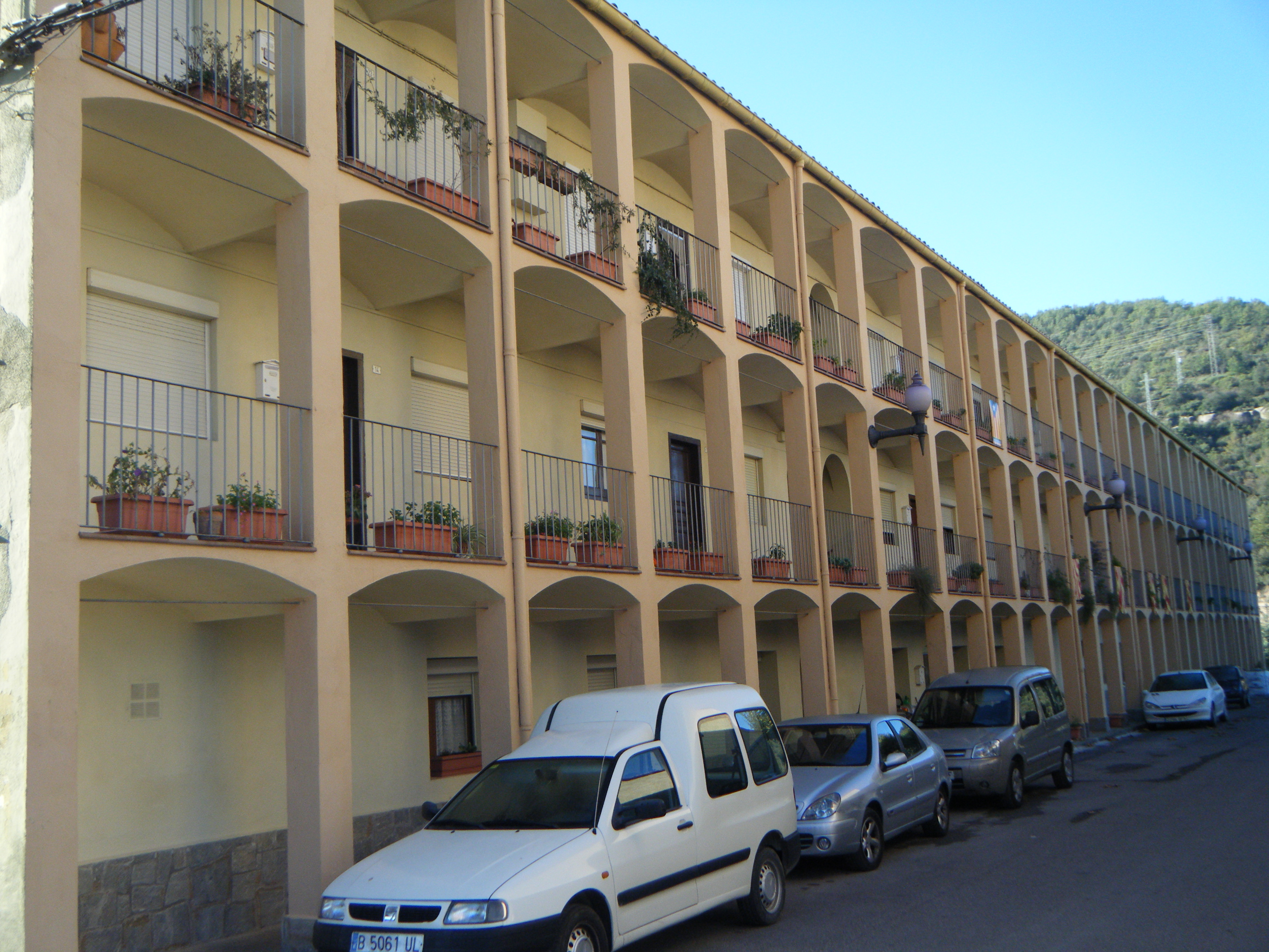 Galeries dels habitatges, Viladomiu Nou